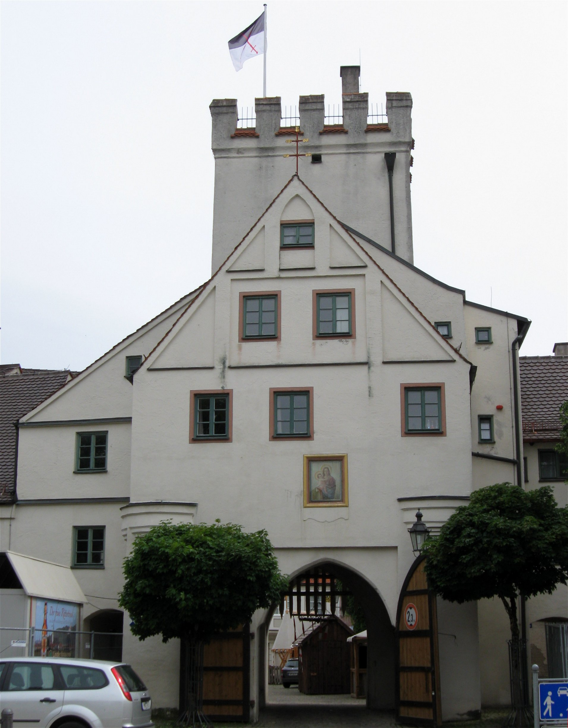 Kornstraße 32, 34; Einlasstor, quadratischer, fünfgeschossiger Torturm mit spitzbogiger, tonnengewölbter Durchfahrt, Zinnenkranz und nördlichem Vorbau, um 1500; siehe Stadtbefestigung. D-7-78-173-65